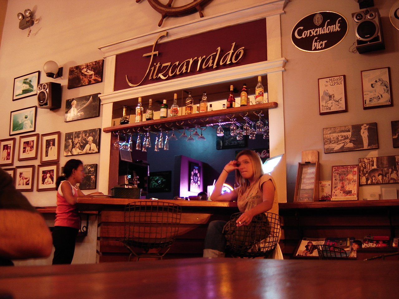 Frente al Malecon en Iquitos, un sitio para tomar un trago y probar la comida de la región de Loreto - Iquitos, Perú